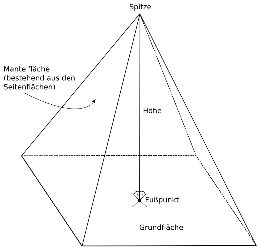 Quadratische Pyramide